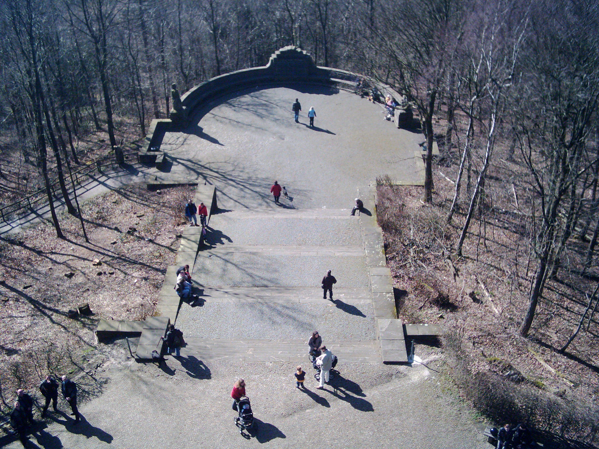 Blick vom Hermannsdenkmal, Detmold, in westlicher Richtung